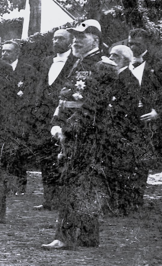 Detail aus einer Aufnahme der Grundsteinlegungsfeier am 31. Mai 1895. Der kommandierende Admiral Knorr.